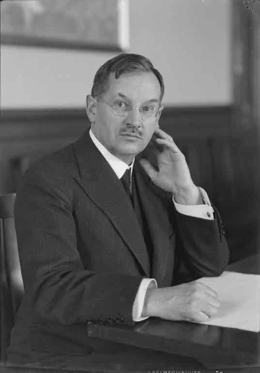 Emil Klöti (Zürich / Schweiz); Originallegende: Presseporträt: Ständerat Dr. Klöti